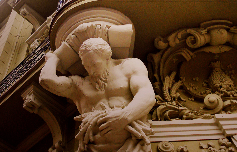 Atlante Velho, detalhe da fachada da Confeitaria Rocco, Porto Alegre, Brasil. Cores editadas